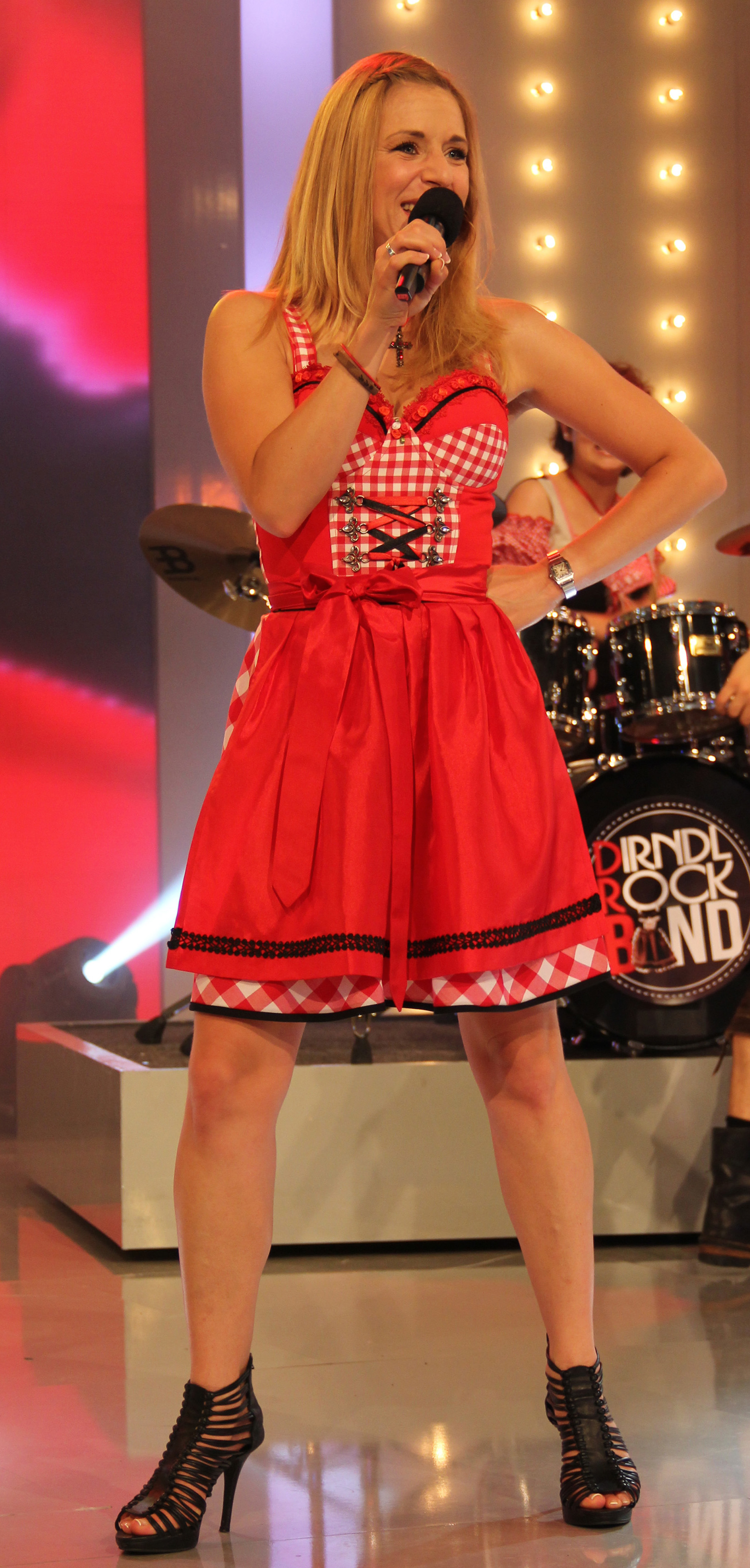 Stefanie Hertel bei der Aufzeichnung der HR Sendung "Hier spielt die Volksmusik" auf dem Hessentag 18.06.2013 in Kassel.